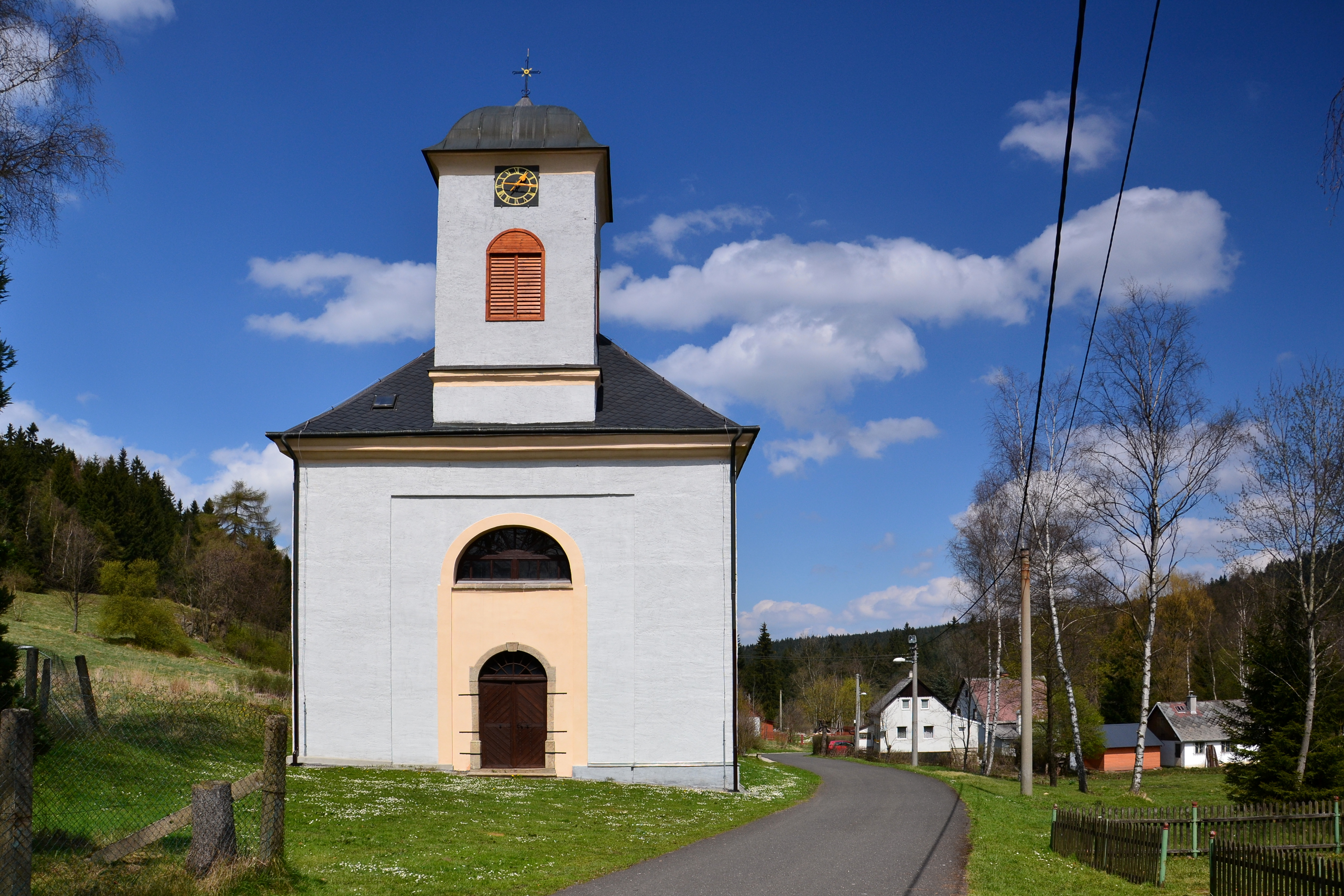 Kostel svatého Kryštofa